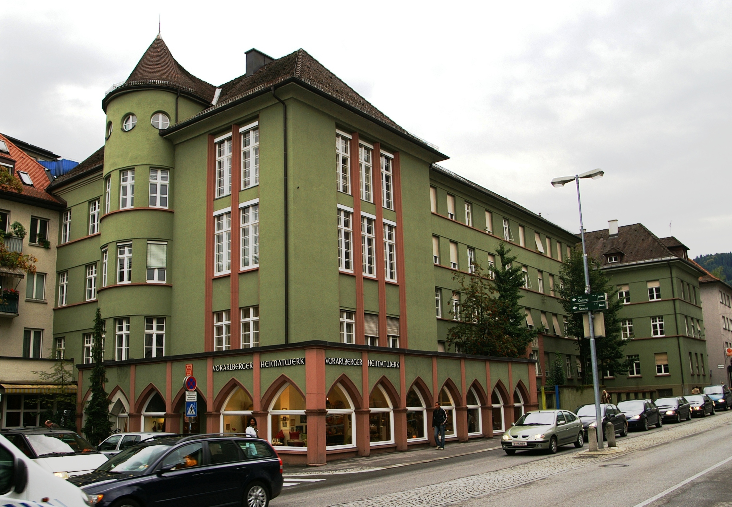 Vorarlberger Bauernkammer Bregenz, Montfortstrasse 4, Architekt: Willibald Braun Baujahr 1925/26